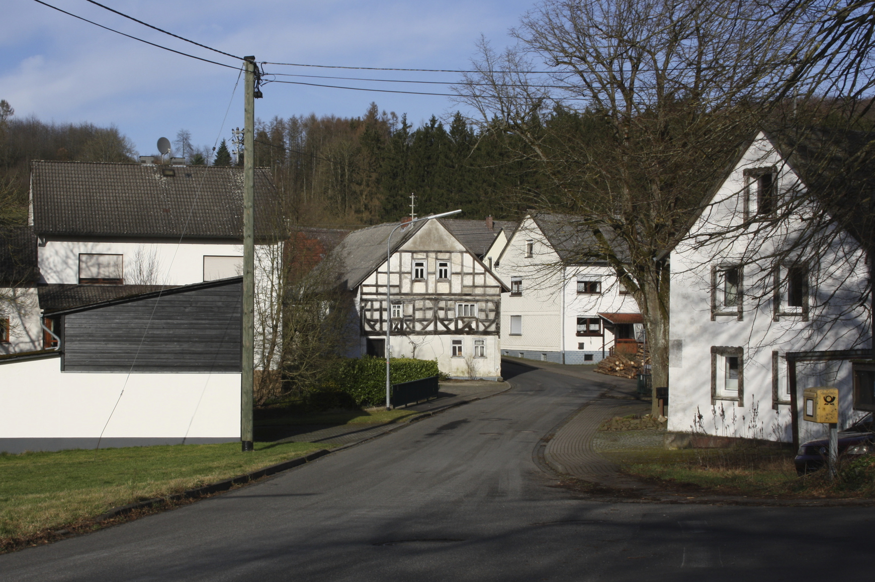 Niedersayn, Westerwaldkreis, Rheinland-Pfalz, Deutschland